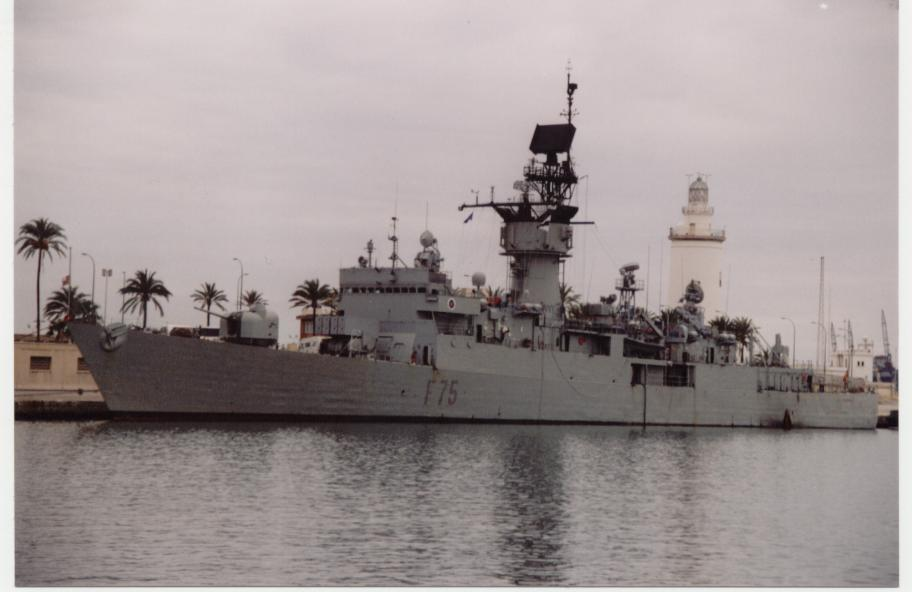 Fragata Extremadura (F-75), de la Armada Española, perteneciente a la clase Balares, puerto de Málaga